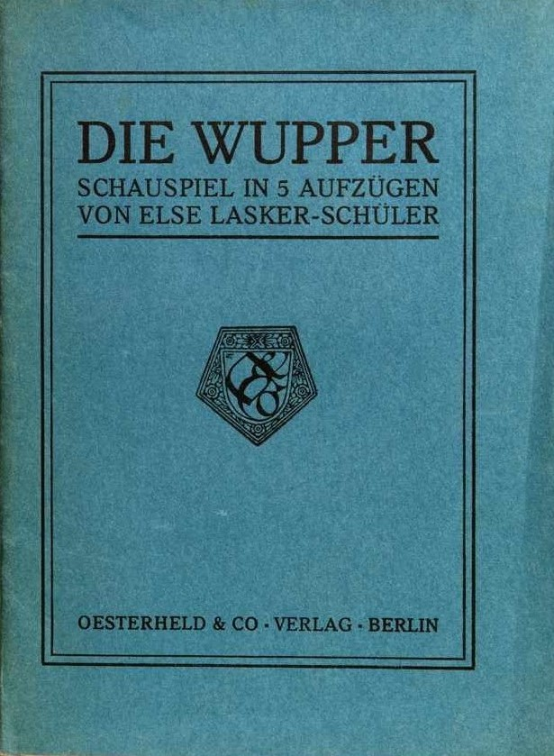 Else Lasker-Schüler: Die Wupper. Schauspiel in 5 Aufzügen. Berlin, Oesterheld & Co, 1909. Erste Ausgabe